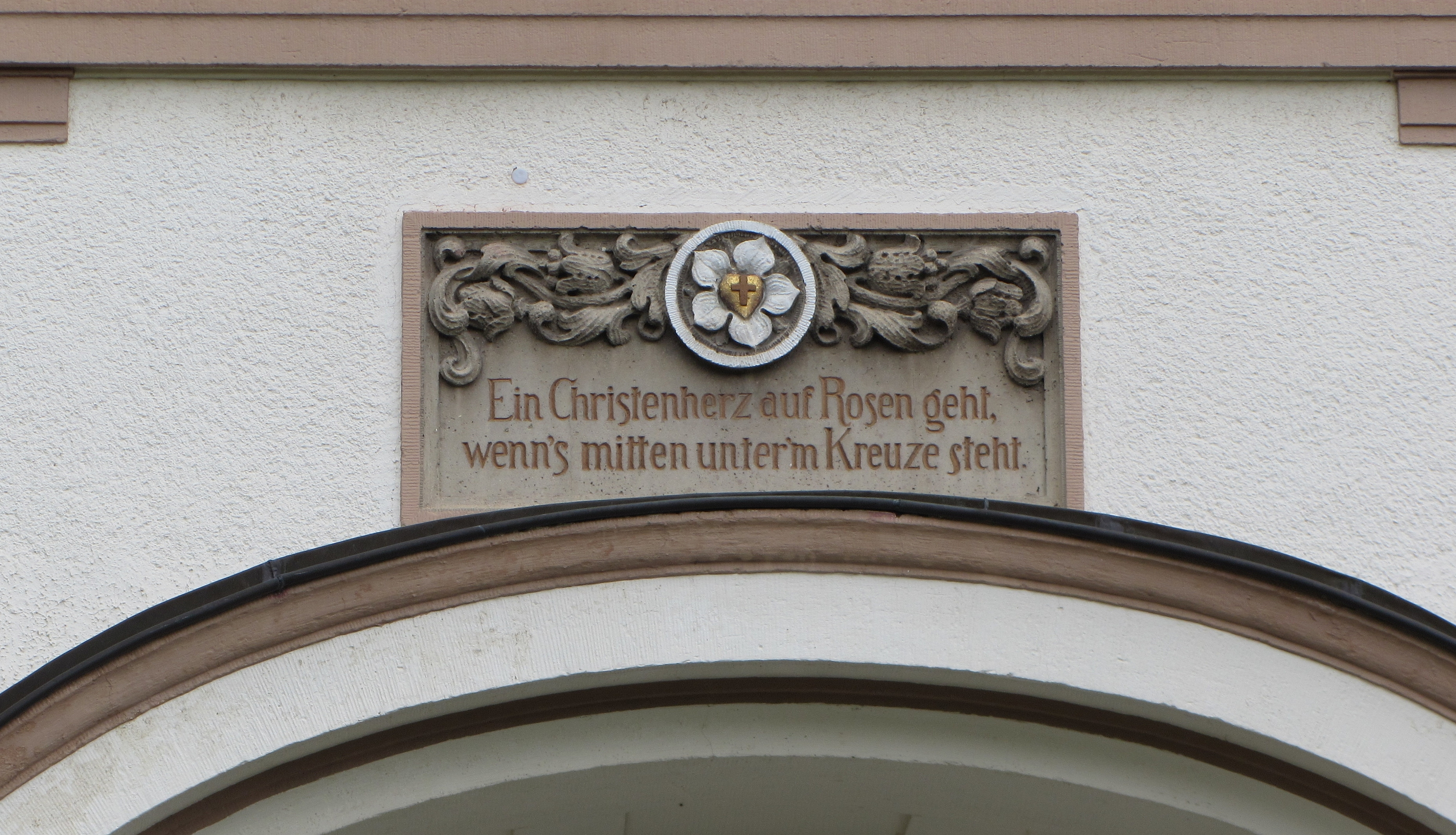 Krankenhaus Neu Bethlehem in Göttingen: Inschrift